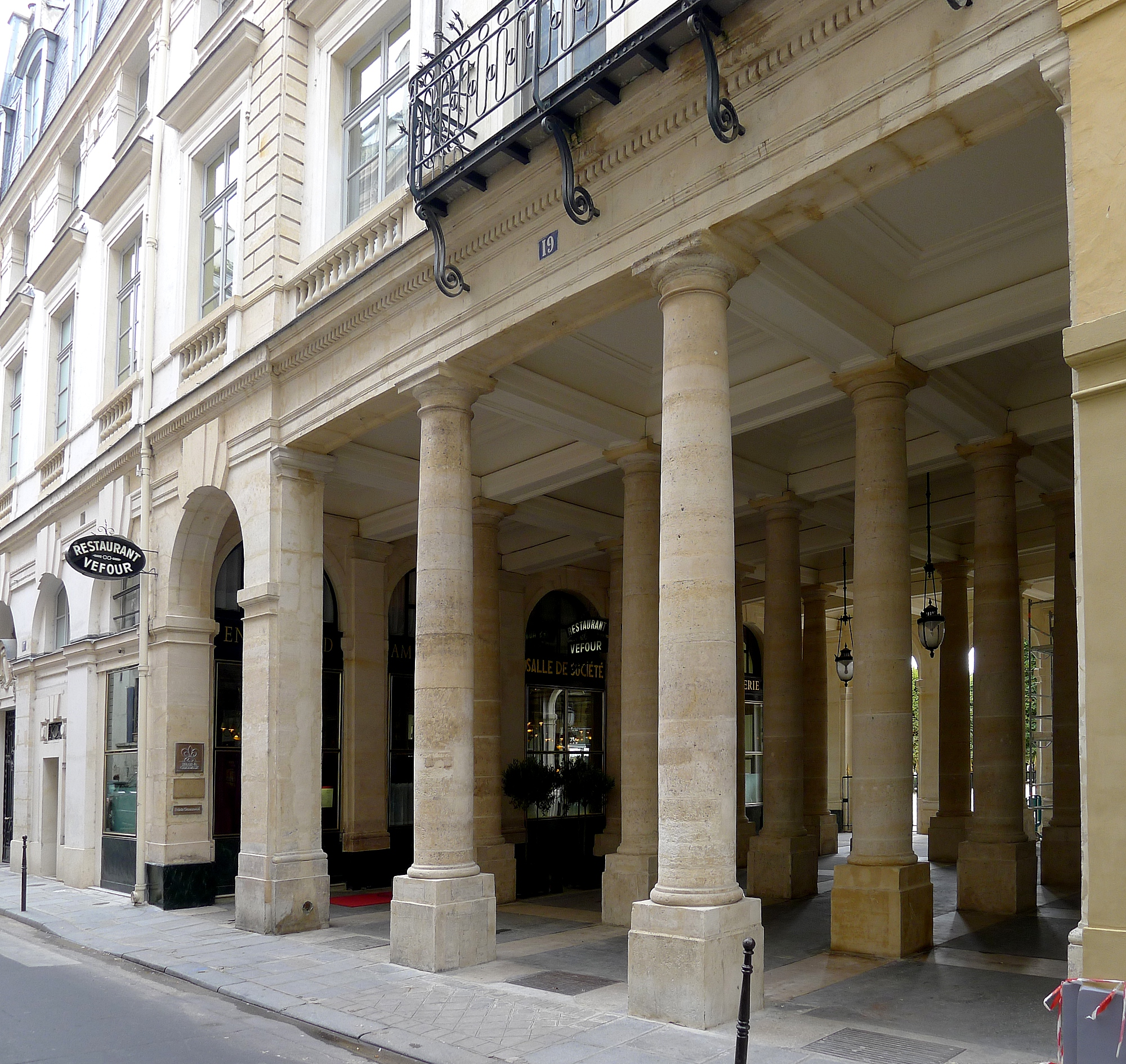 Rue de Beaujolais (le grand Vefour) - Paris Ier